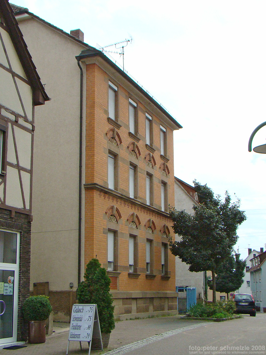 Denkmalgeschützte Gebäude Querstr. 9 in Heilbronn-Böckingen